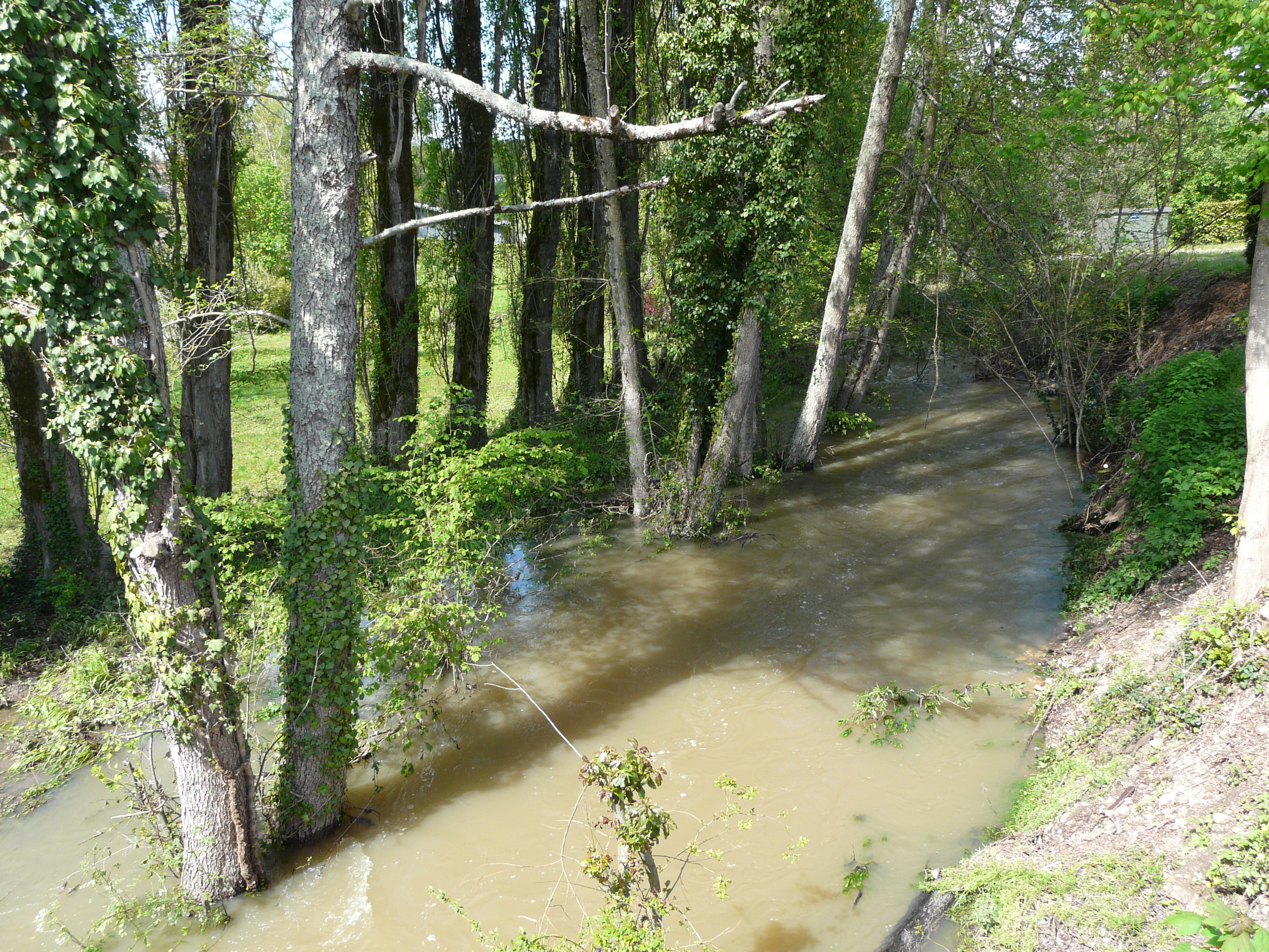 Le Farganaud en crue, en amont du pont de la route départementale 3, Saint-Laurent-des-Hommes, Dordogne, France.